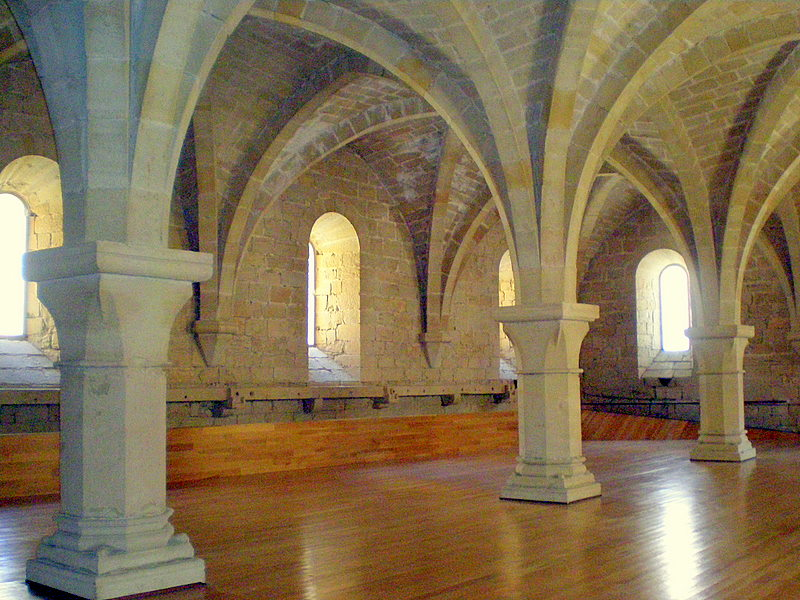 Celler - Cobert amb voltes de creueria que reposen sobre pilarsvuitavats. Sembla que aquesta estança anteriorment fou refetor de conversos, puix que consten documentalment les deixes que per a la seva construcció feren Arnau de Timor el 1225 i Guillem de Guàrdia el 1234